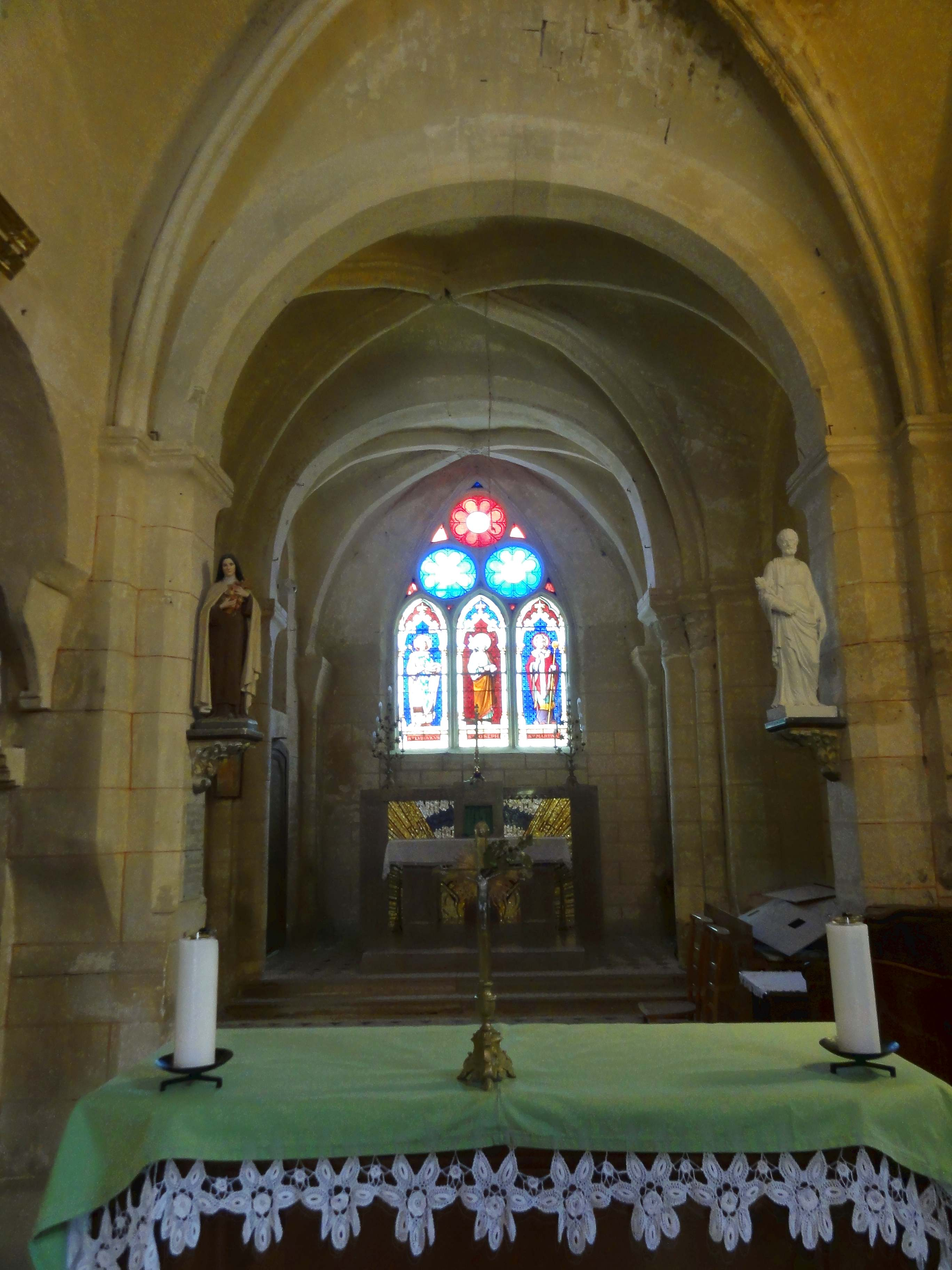 Intérieur de l'église Saint-Martin de Labbeville (voir titre).